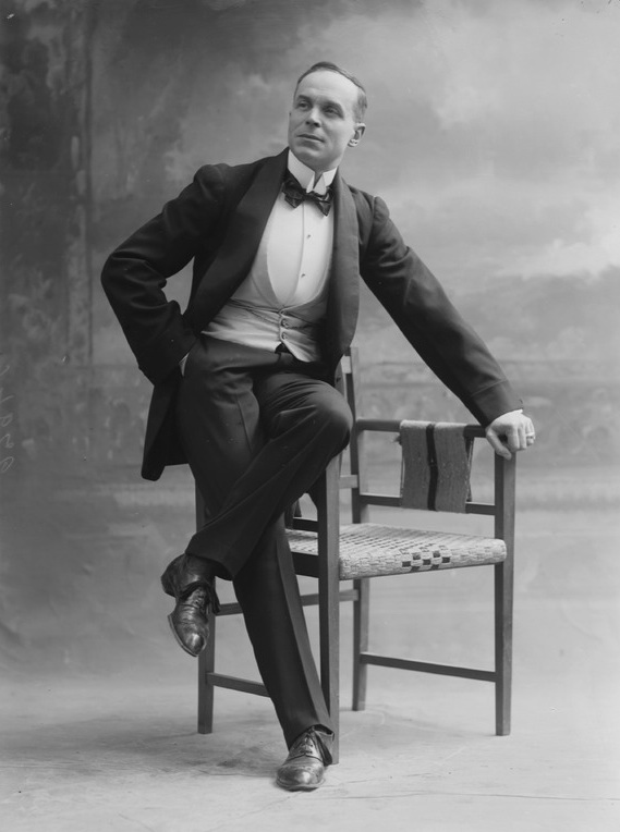 attore Ugo Farulli